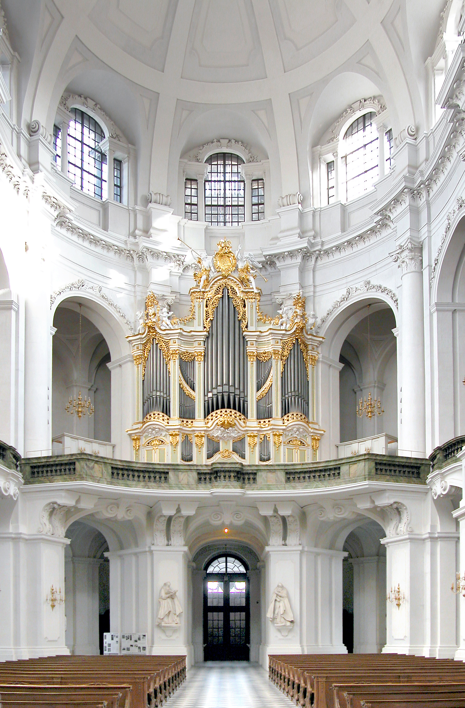 07.02.2007 01067 Dresden, Schloßplatz: Kathedrale Ss. Trinitatis (ehem. kath. Hofkirche, 1739-1751). Der Orgelprospekt ist im Kriege verbrannt, hier eine Nachbildung. Das Orgelwerk der letzten und größten Orgel Gottfried Silbermanns blieb erhalten. [DSCN20789.TIF]20070207040DR.JPG(c)Blobelt